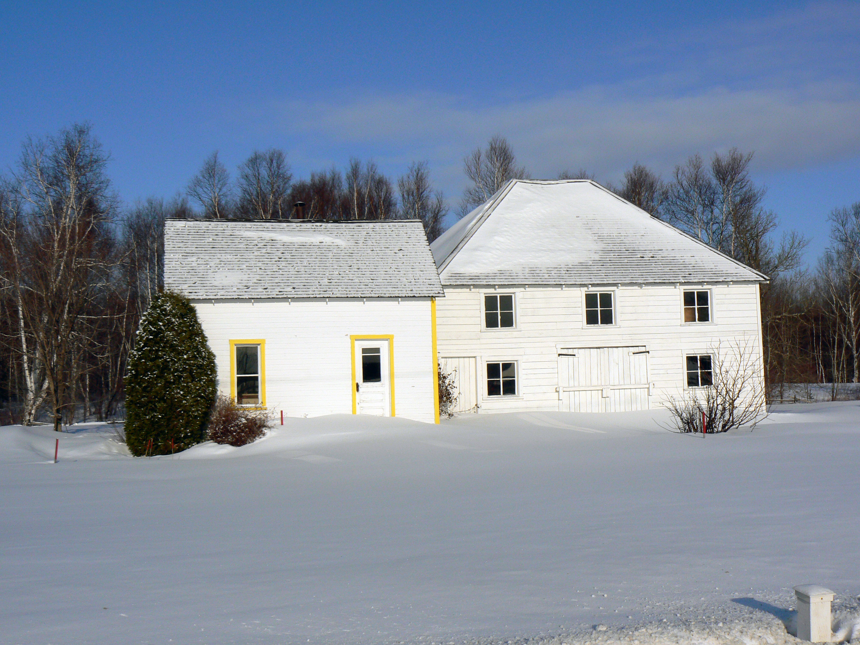 Maison de Samuel Bédard à Péribonka dans laquelle l'écrivain Louis Hémon chez qui il était employé, a vécu lors de son séjour dans la colonie en 1912. Elle fait désormais partie du site du musée Louis-Hémon.